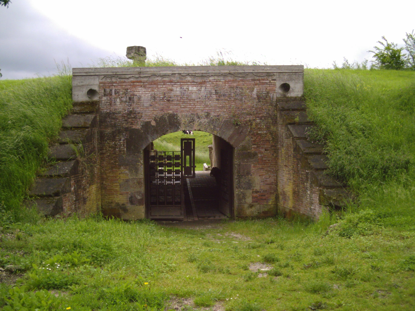 Marsal 57 France, Potterne sud